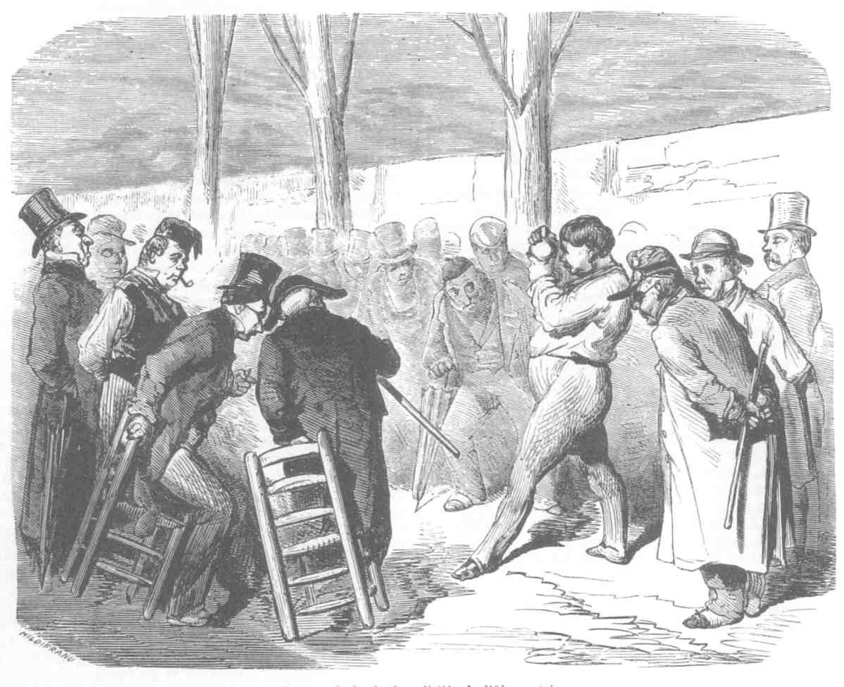 Joueurs de boule dans l'avenue de l'Observatoire à Paris, représentés par Gustave Doré. Dessin illustrant la page 209 de l'ouvrage de Émile de Labédollière "Le Nouveau Paris", Gustave Barba Libraire Éditeur, Paris 1860.